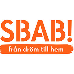 SBAB logotyp